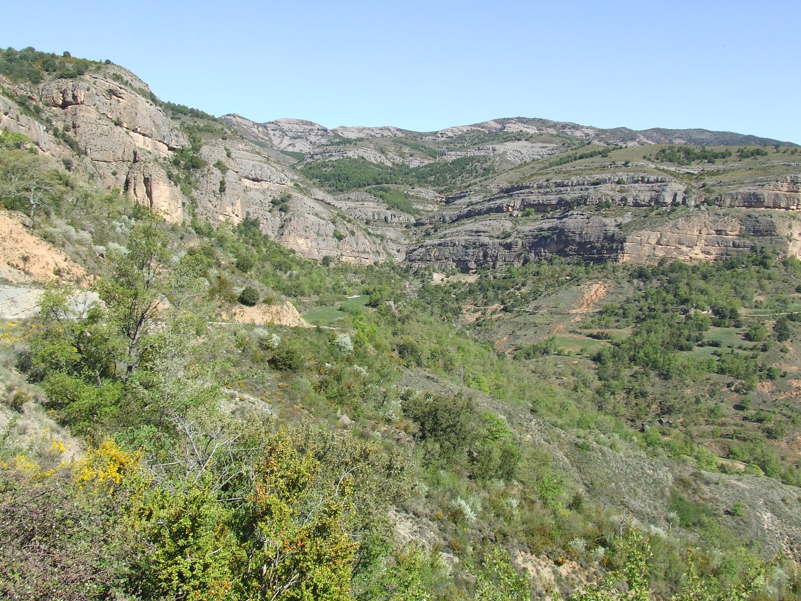 El barranc dels Lleons a Gurp (Gurp de la Conca, Tremp, Pallars Jussà)